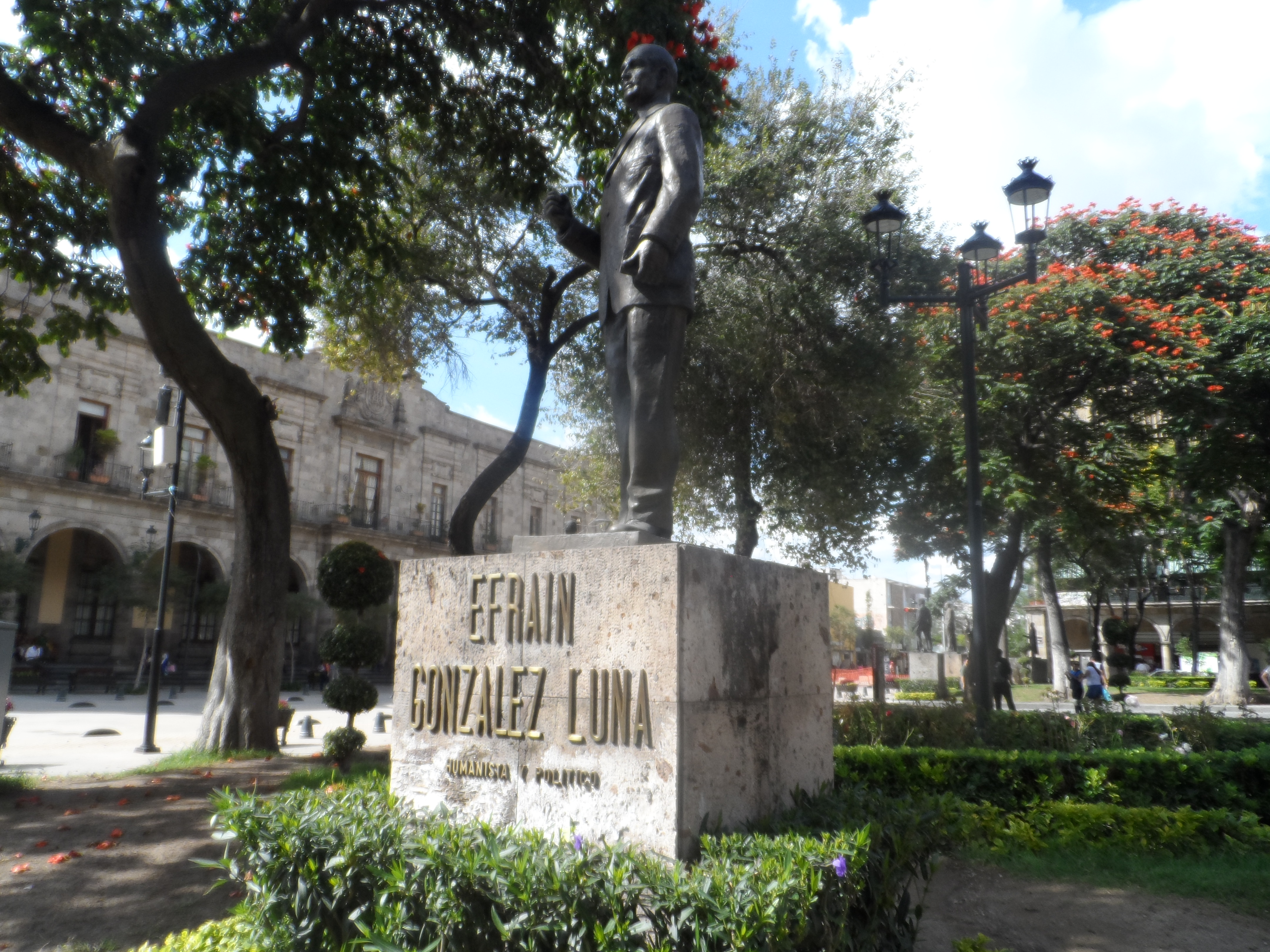 Estatua del político jalisciense Efraín González Luna en la "Rotonda de los Jaliscienses Ilustres".